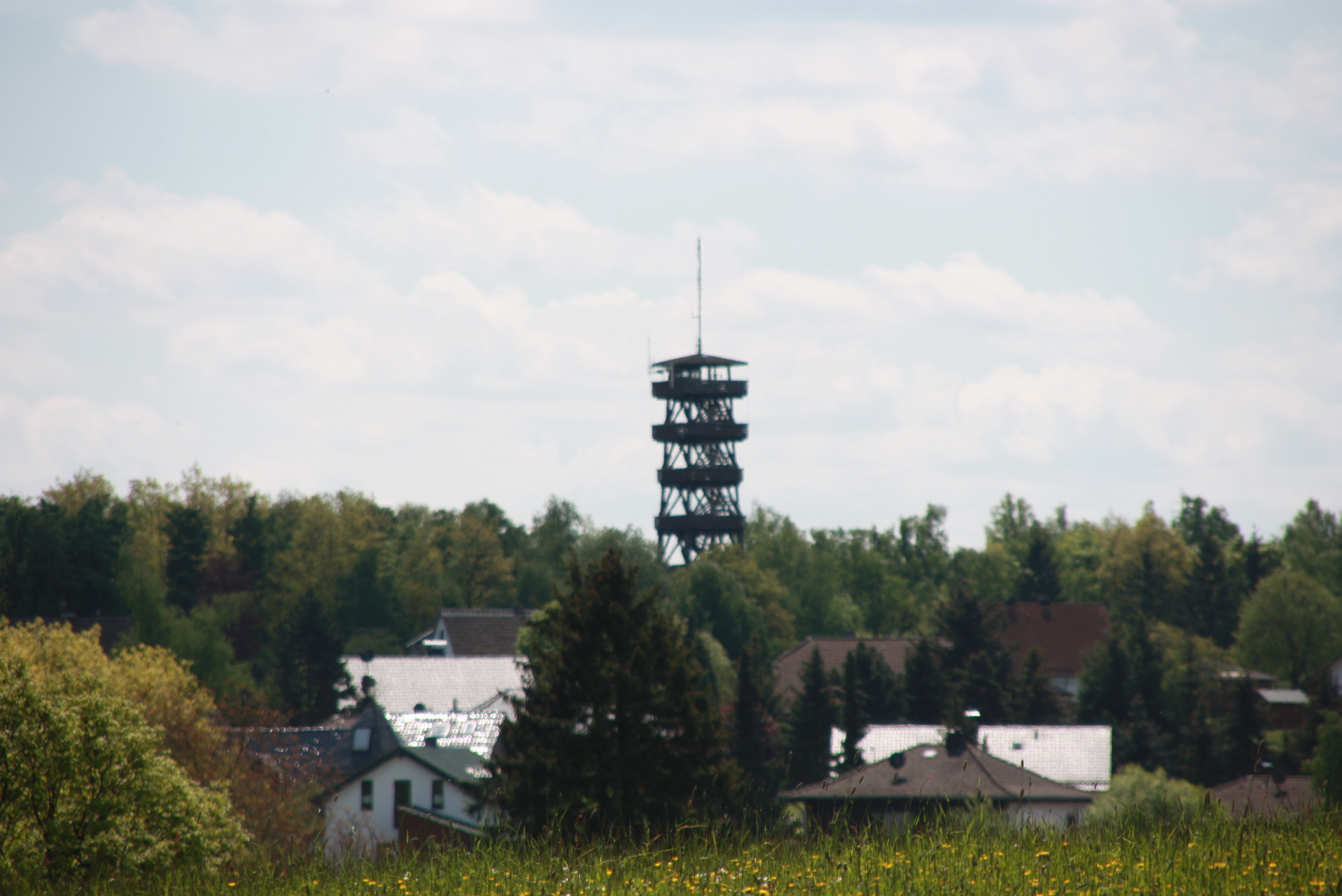 Der ehemalige Feuerwachtturm in Wolfgarten